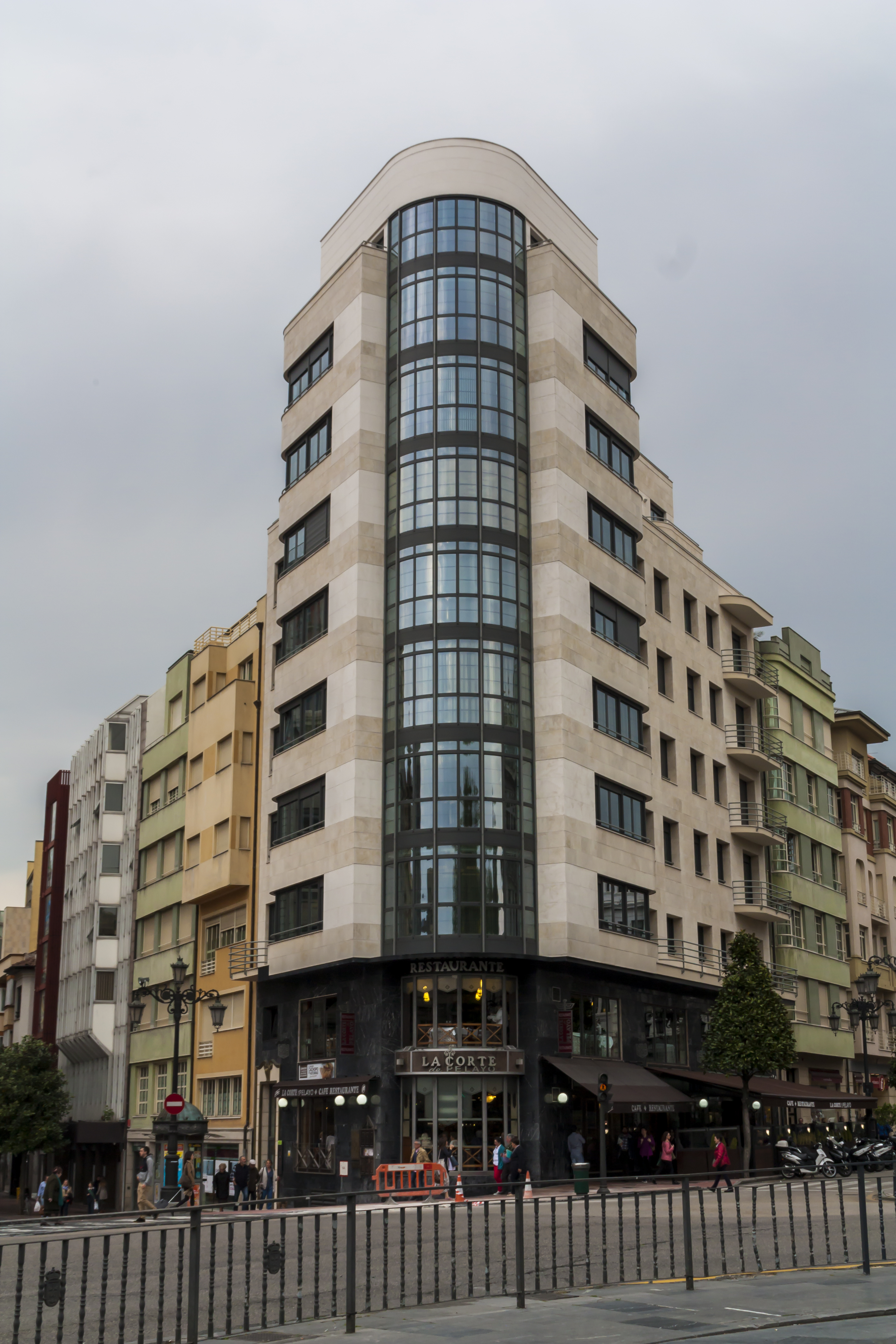 Oviedo, de ayer a hoy.